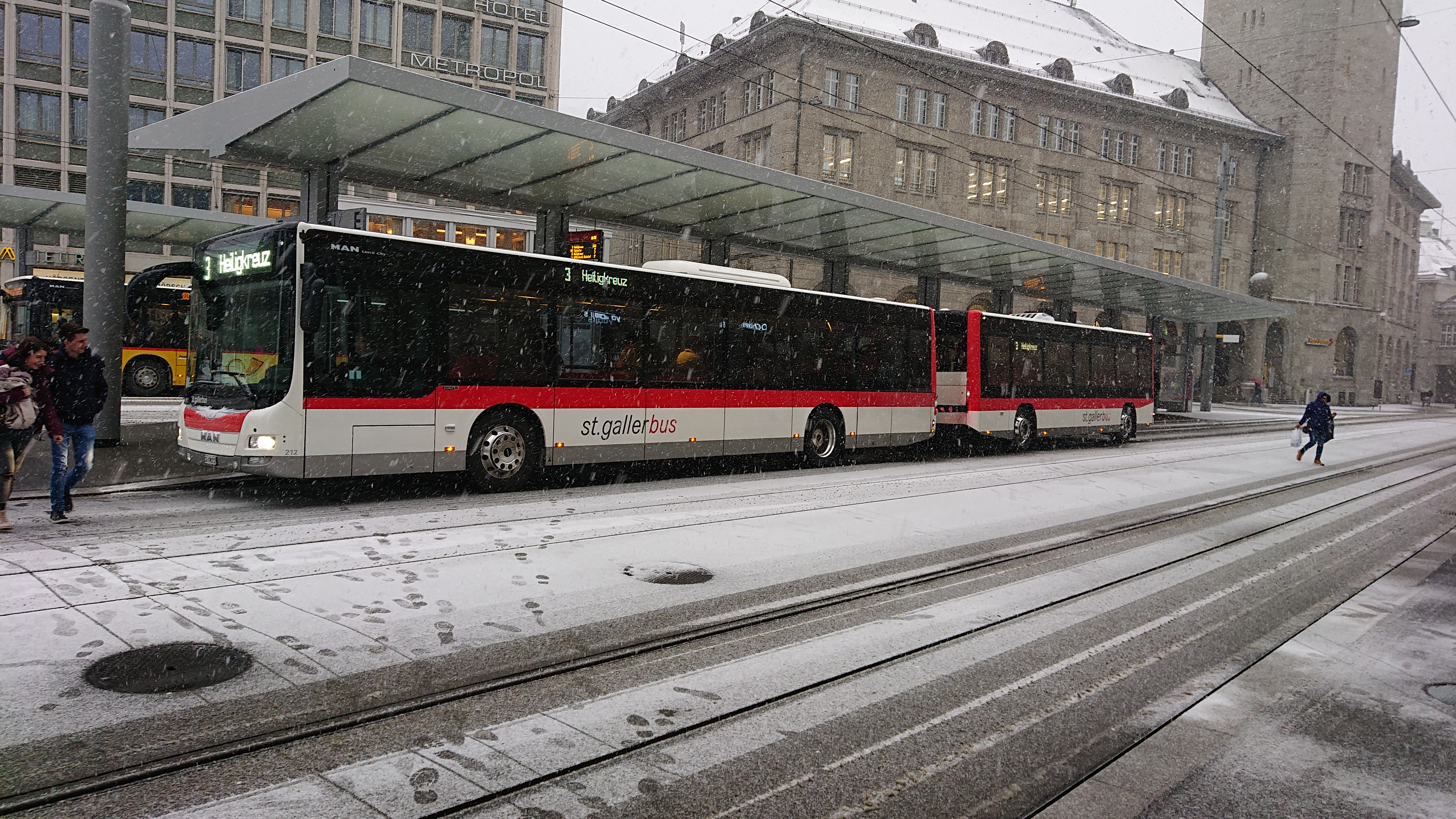 MAN Solobus Zweiachsig mit Anhänger (Hess) als Buszug der VBSG im Einsatz seit 12/2018